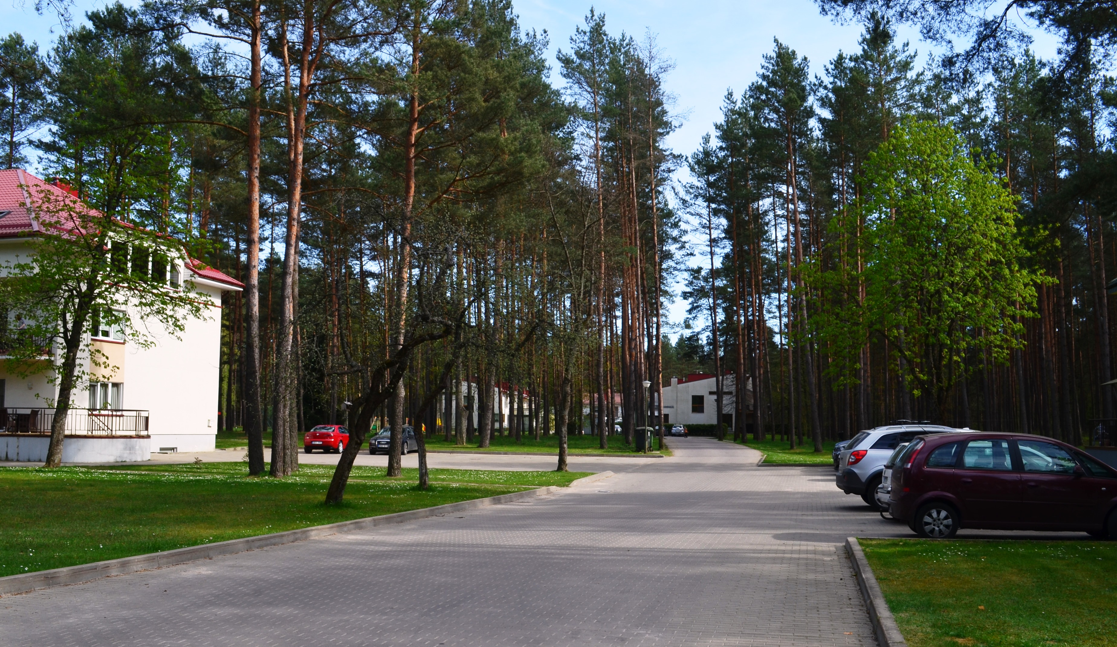 Turniškės, Vilnius